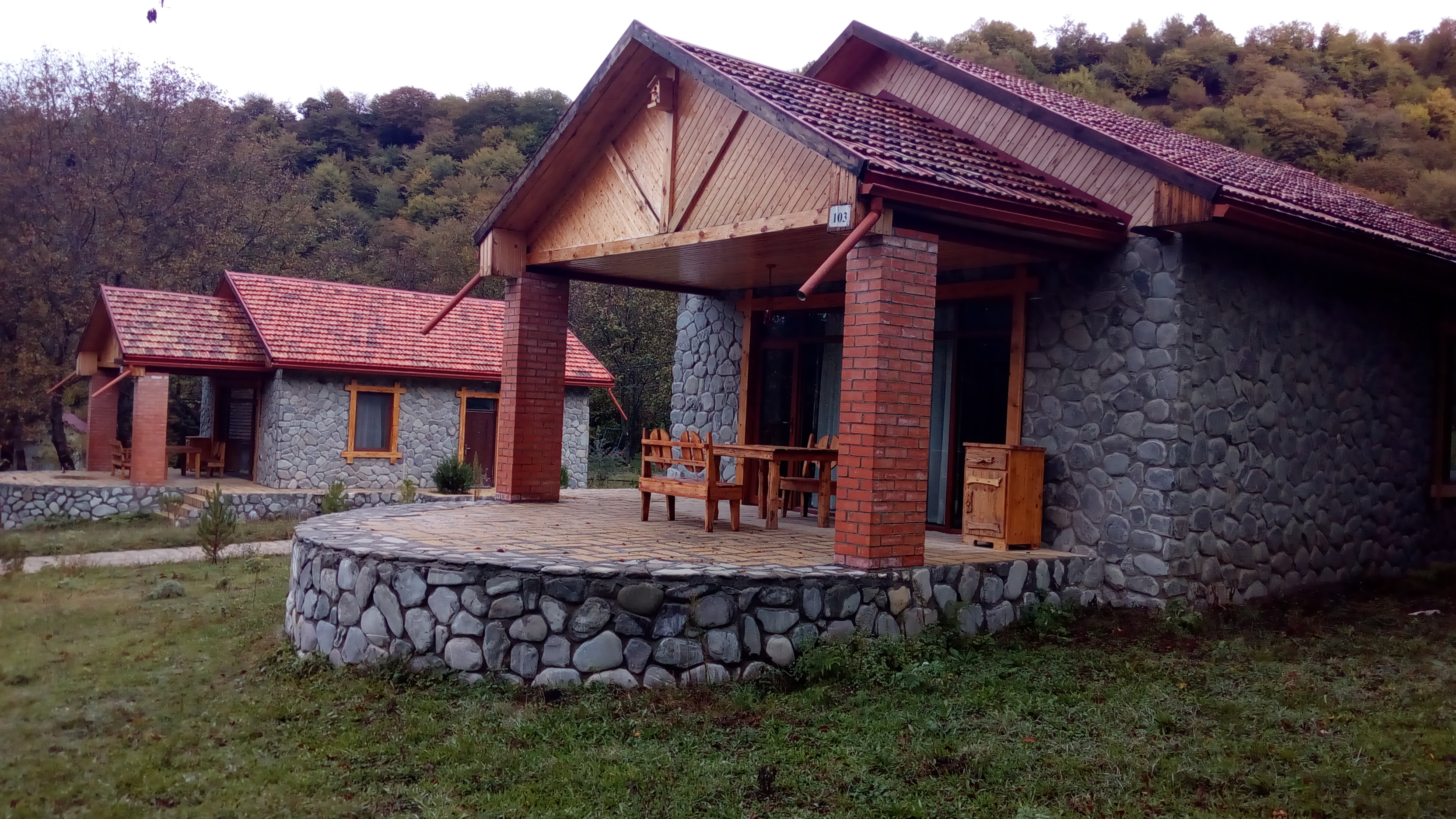 İsmayıllı, Talıstan kəndindəki Talıstan Forest Park